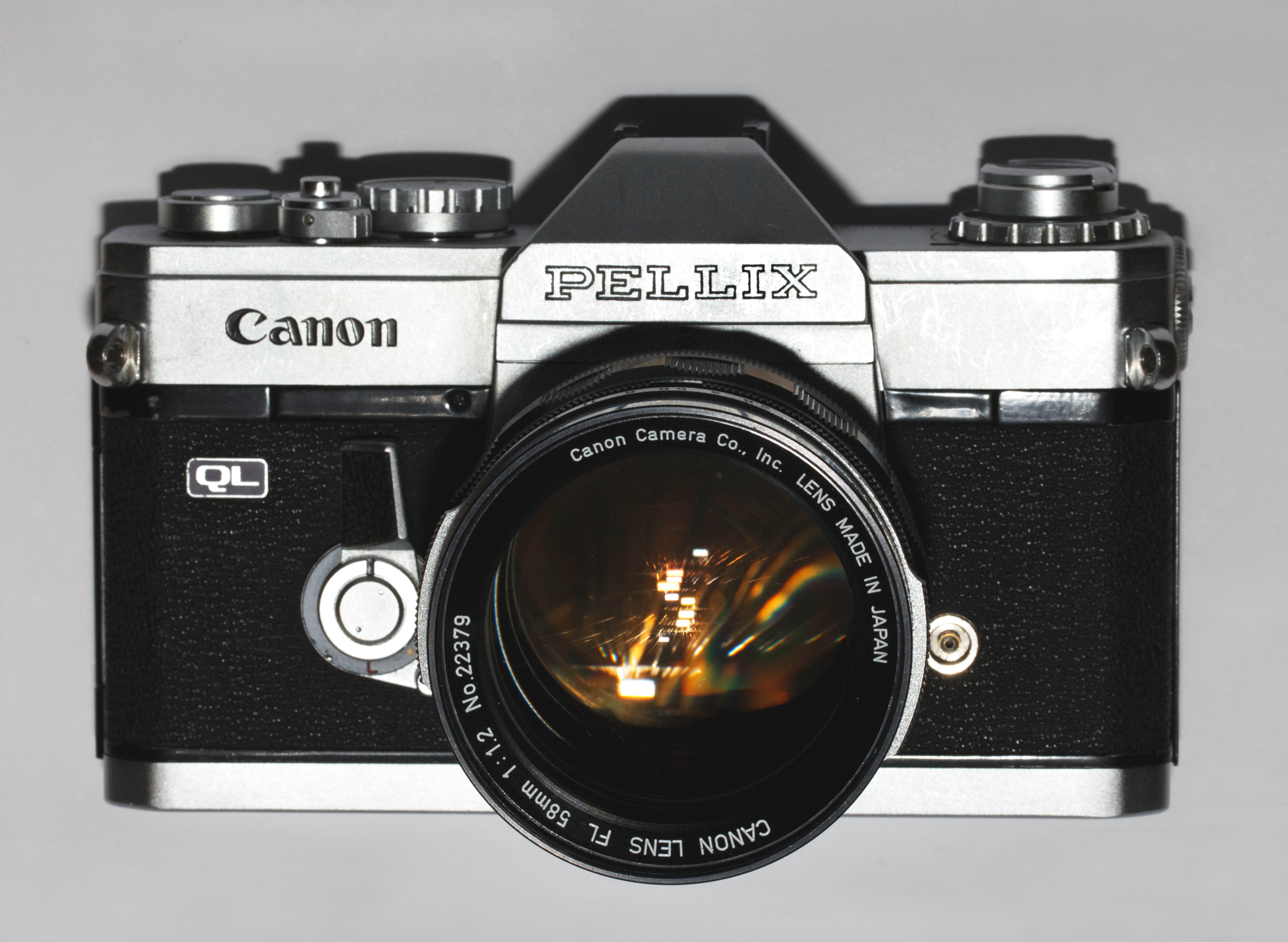 Canon Pellix QL mit Canon FL 1.2/58mm Objektiv